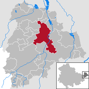 Altenburg in Thuringia - District Altenburger Land